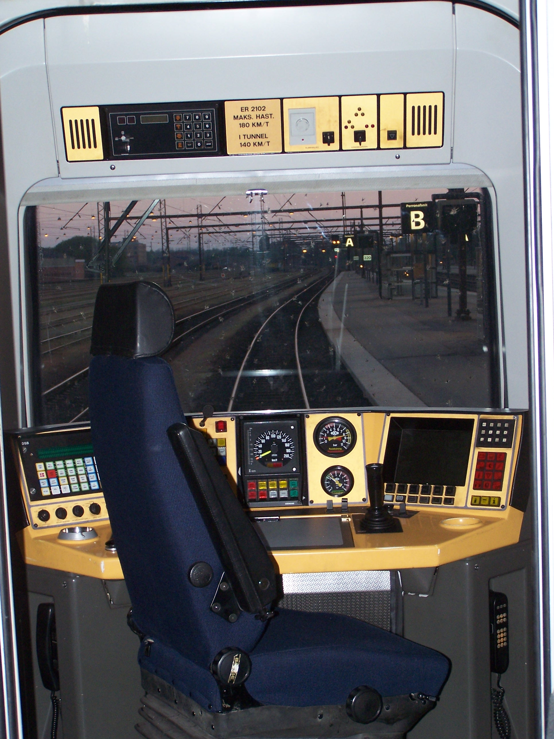 (c) 2006, Niels Elgaard Larsen Danish regional train at Odense station